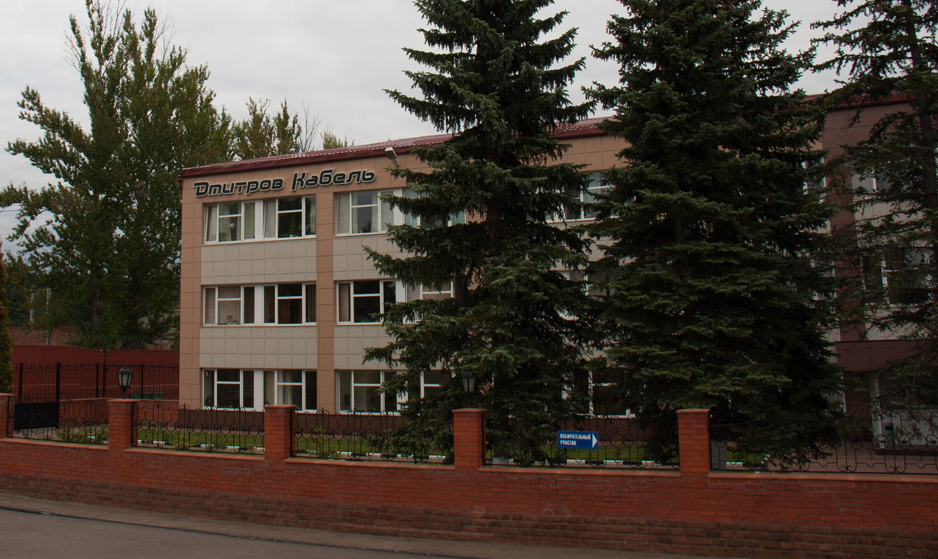 Здание завода Дмитров Кабель в городе Дмитров